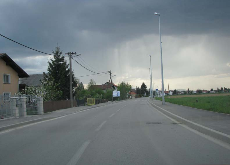 Šibice, Zaprešić